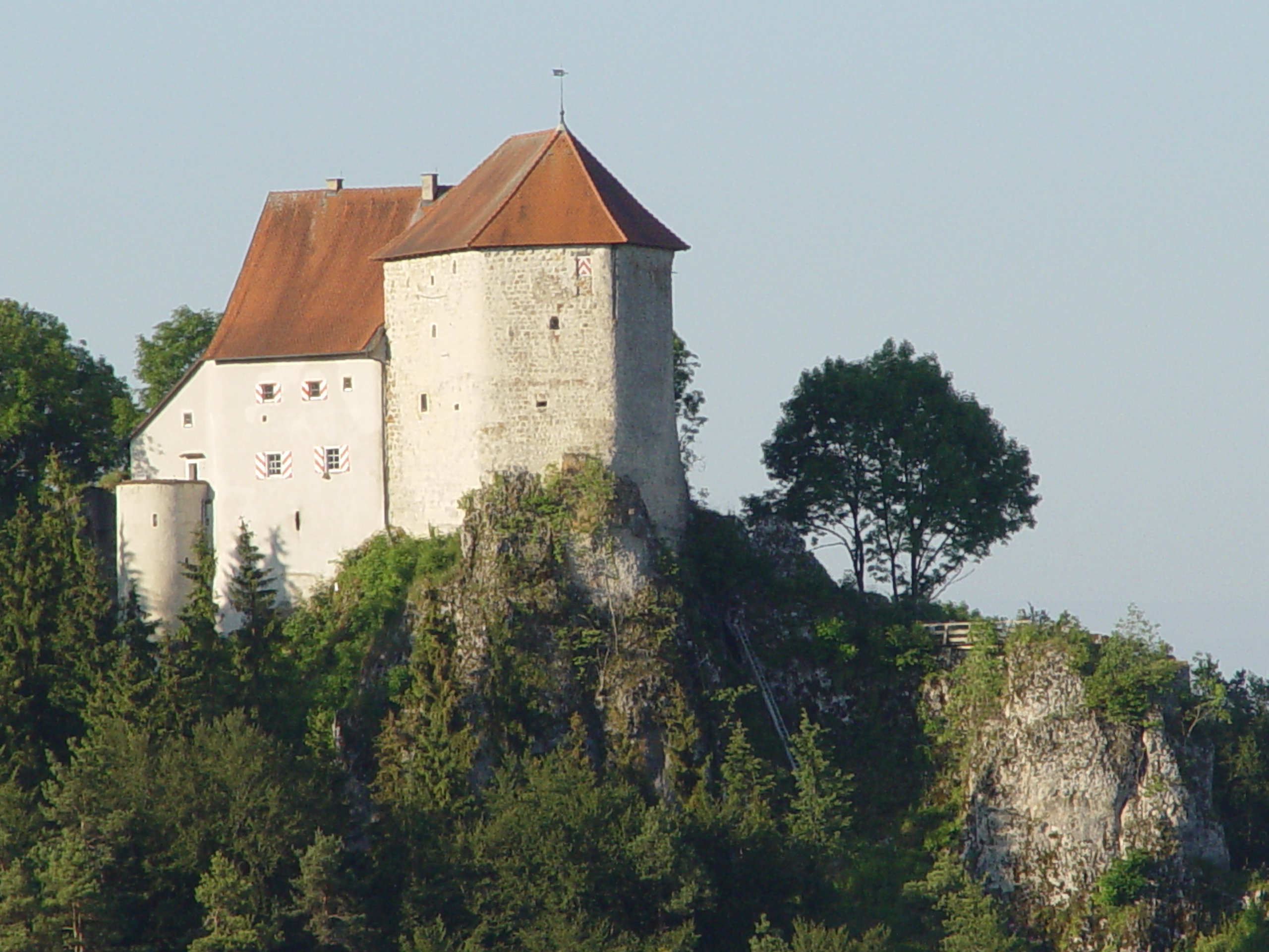 Burg Straßberg in Straßberg (Zollernalbkreis)